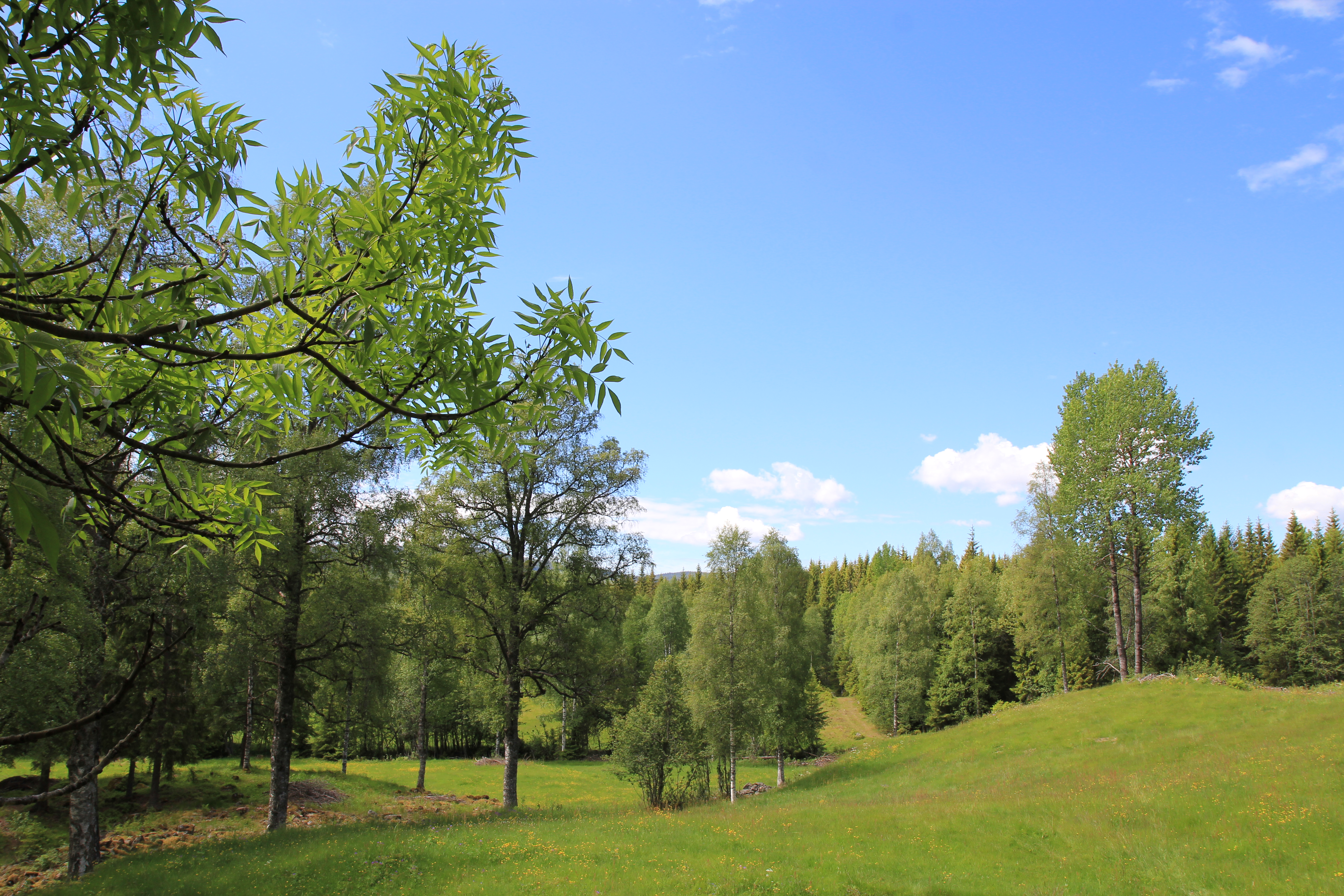 Kulturlandskap ved Embretsseter i Hurdal